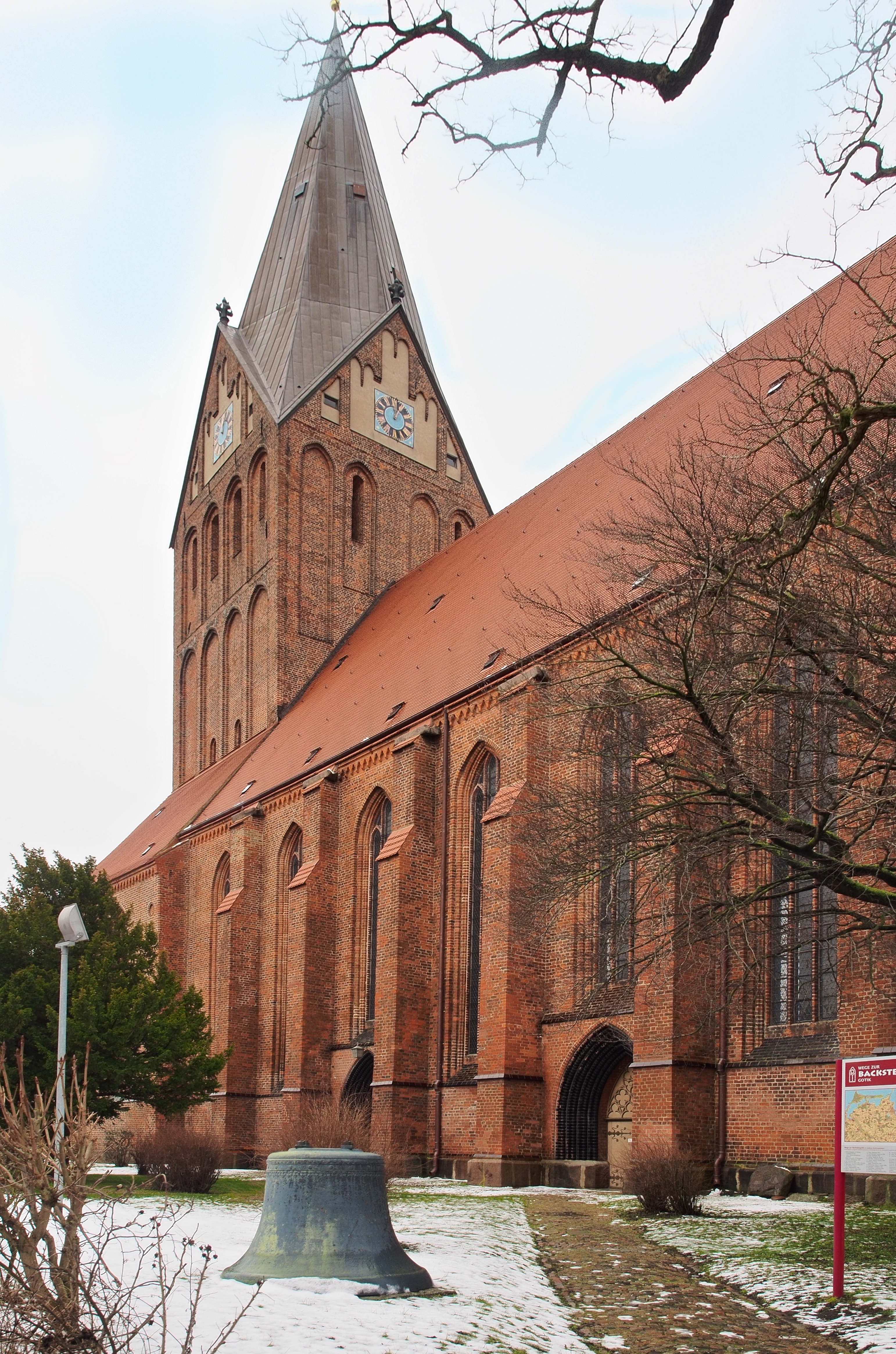 Ansicht der Kirche von Südost